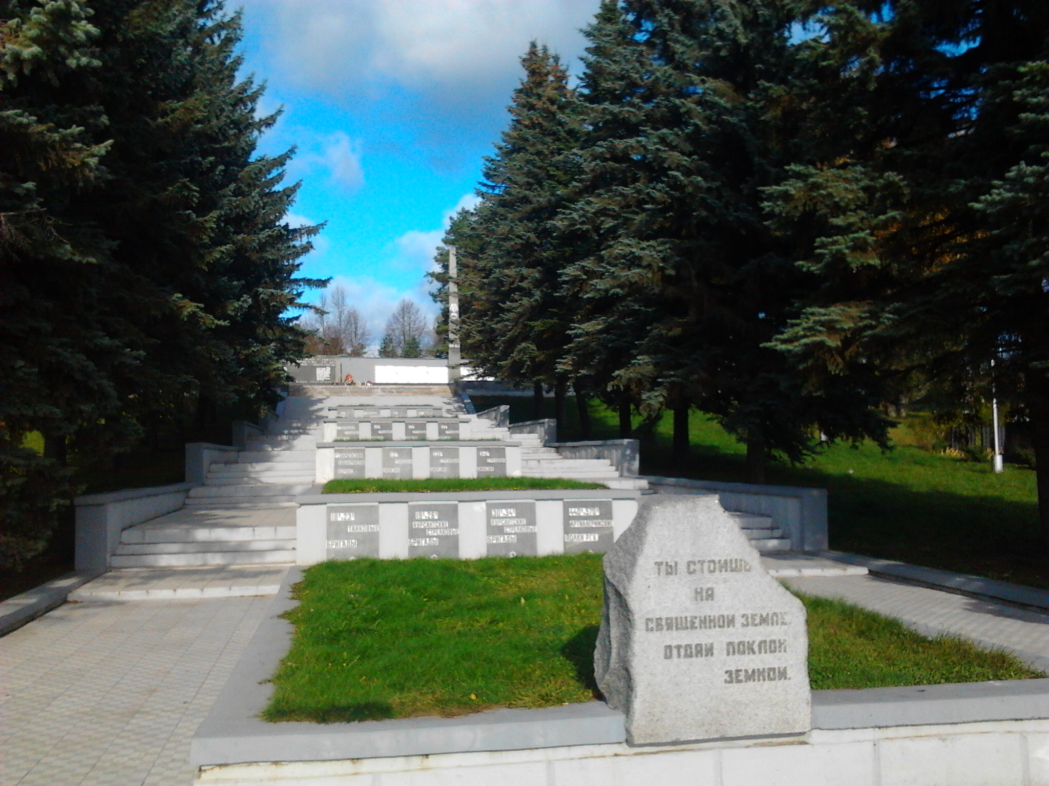 Мемориальный комплекс в честь воинов 49-й армии, погибших в боях с немецко-фашистскими захватчиками при обороне москвы в октябре-декабре 1941: Кремёнки, Жуковский район, Калужская область